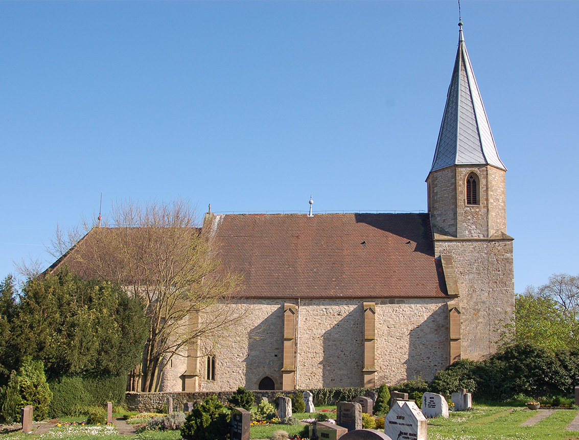 Fast fensterlose Nordfassade der Frauenkirche in Unterriexingen